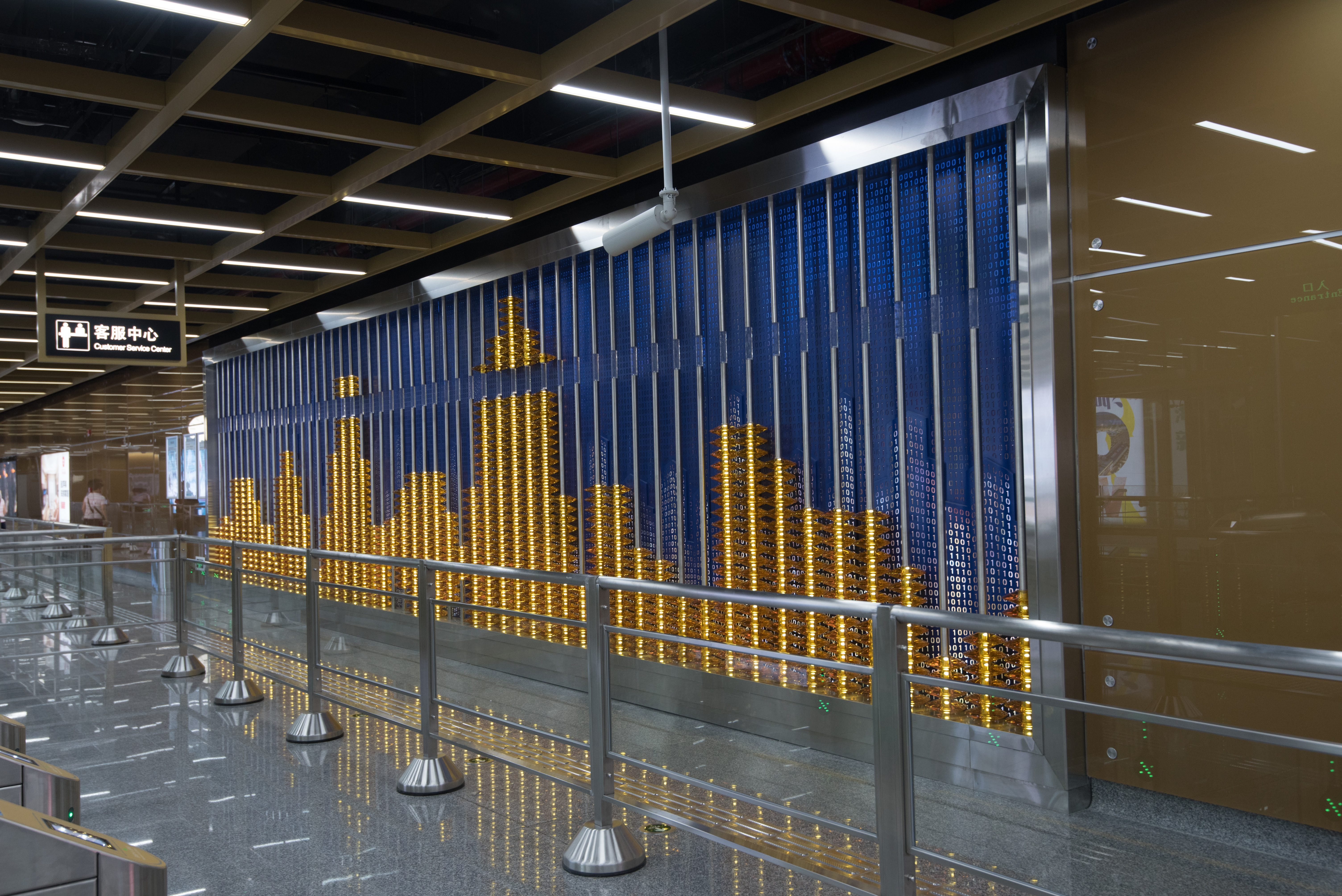 宁波地铁南部商务区站艺术墙“瑞锦荣城”